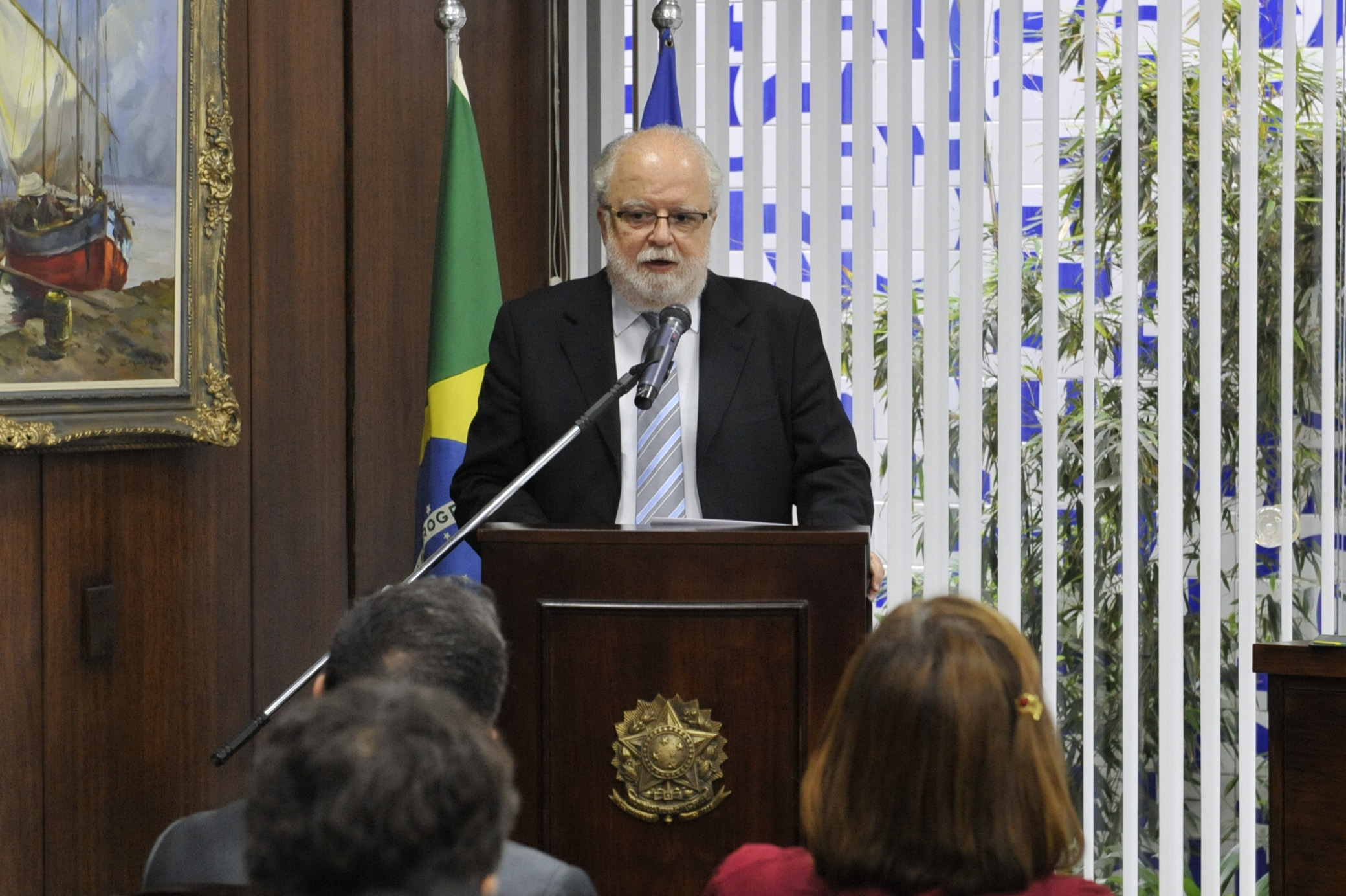 Assinatura de convênio entre o Senado e a UNICAMP, que trata do intercâmbio de dados e da cooperação técnica entre o DataSenado e o SESOP Foto: Jonas Pereira/Agência Senado